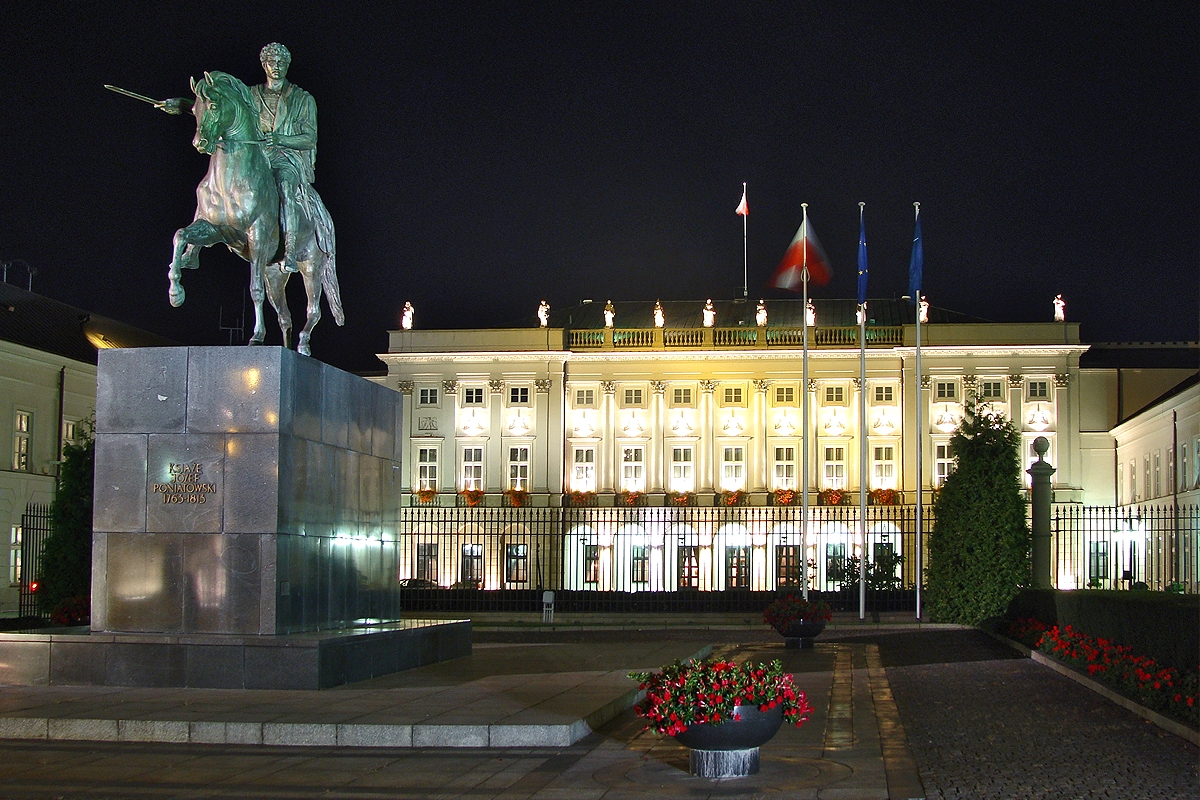 Pałac Prezydencki Warszawa